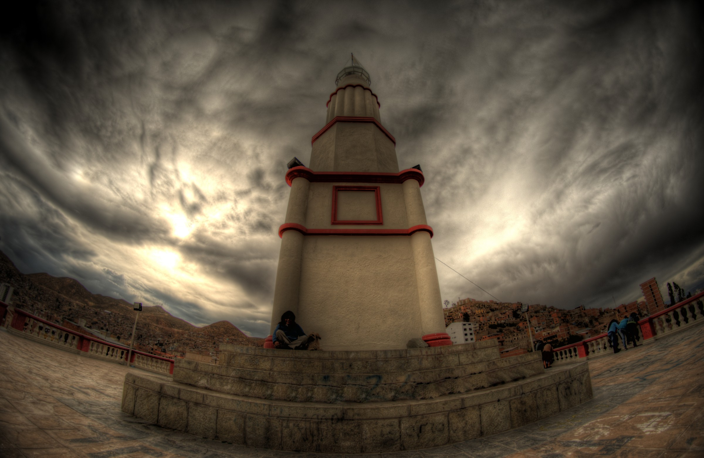 Vista trasera del Faro de Conchupata, Oruro, Bolivia, justo en el mirador del mismo monumento. This medium shows the protected monument with the number O/00-001 in Bolivia.